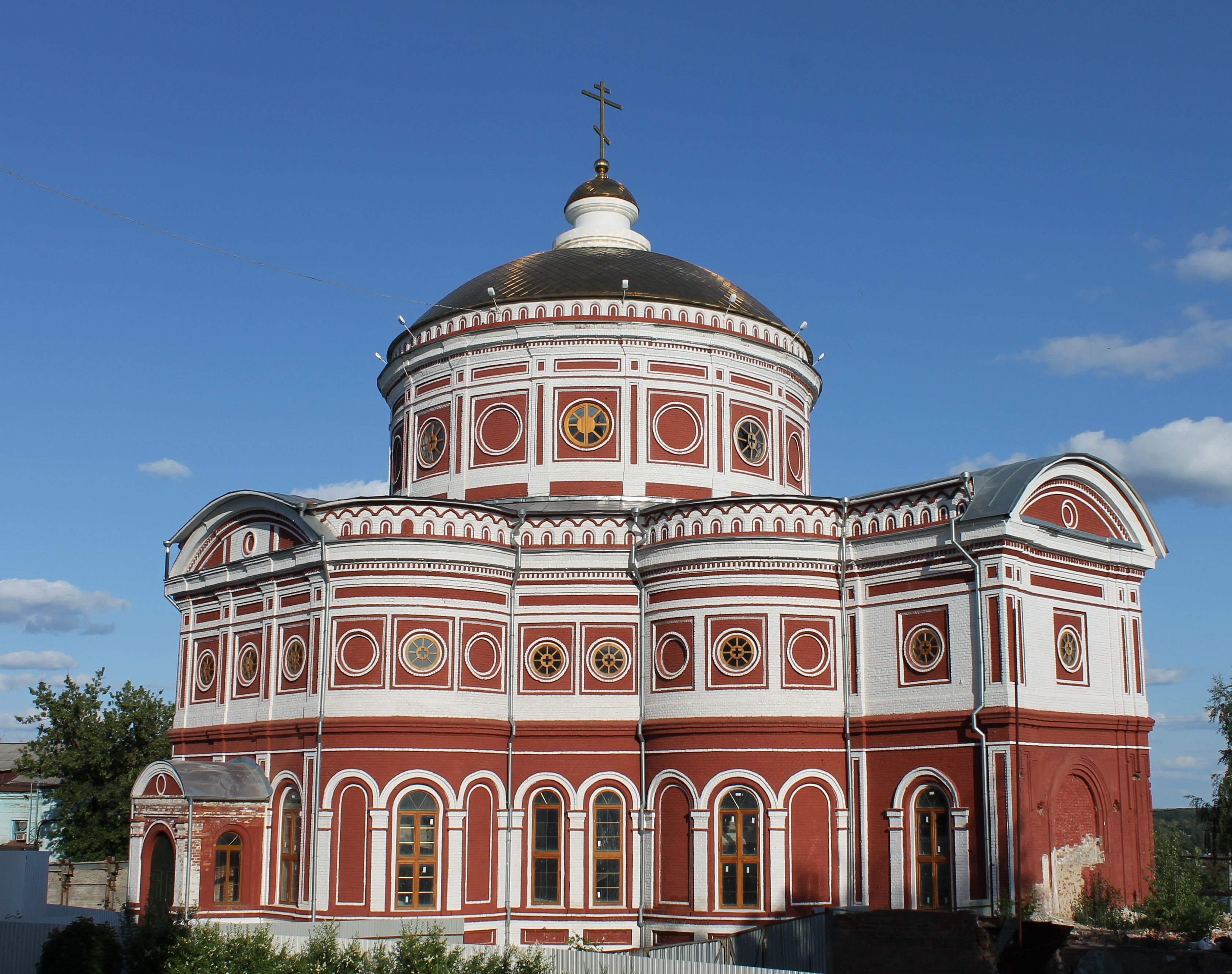 Храм Воскресения Христова на территории Курского Знаменского Богородицкого мужского монастыря в городе Курске.